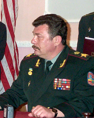 Oleksandr Kuzmuk, Ukrainian Defense Minister, Gen. of the Army